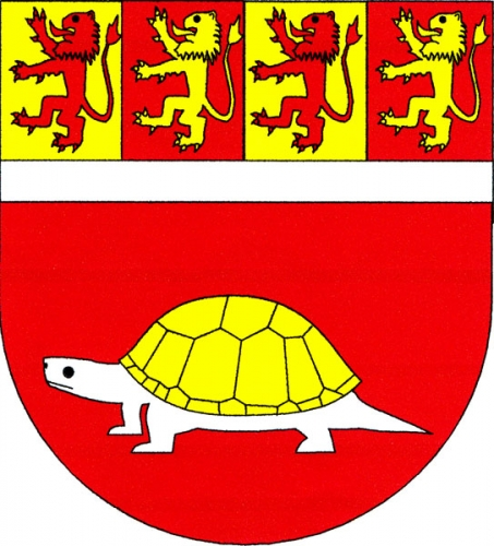 znak, Obyčtov, okres Žďár nad Sázavou